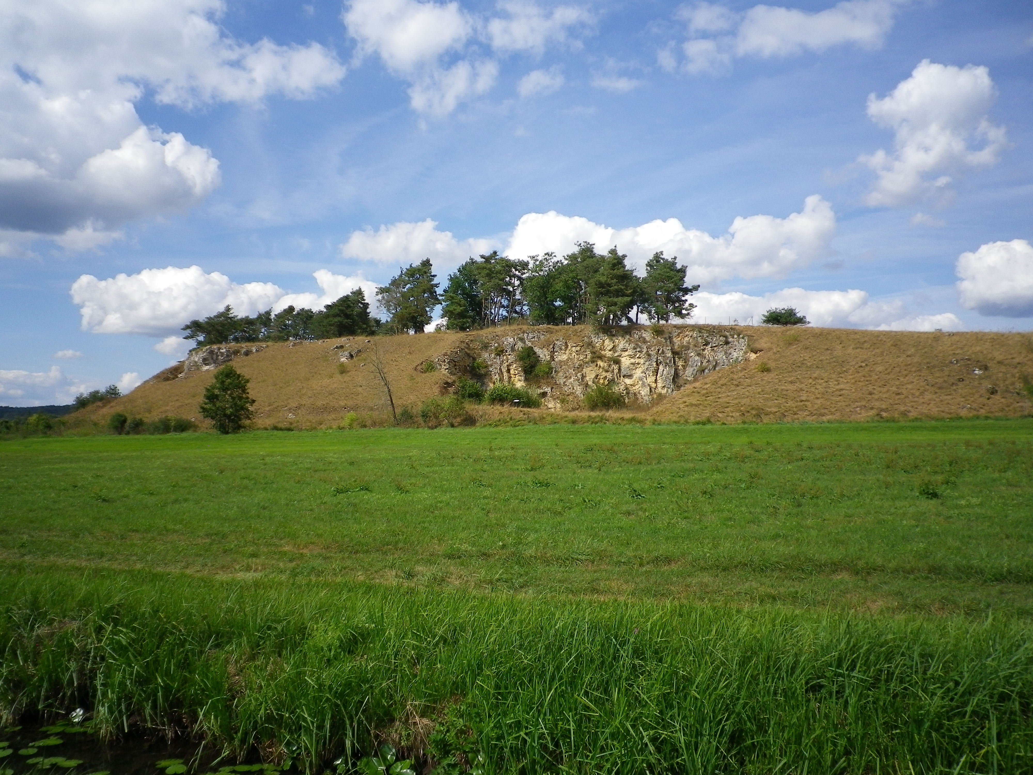 Geotop westlich der Speckmühle